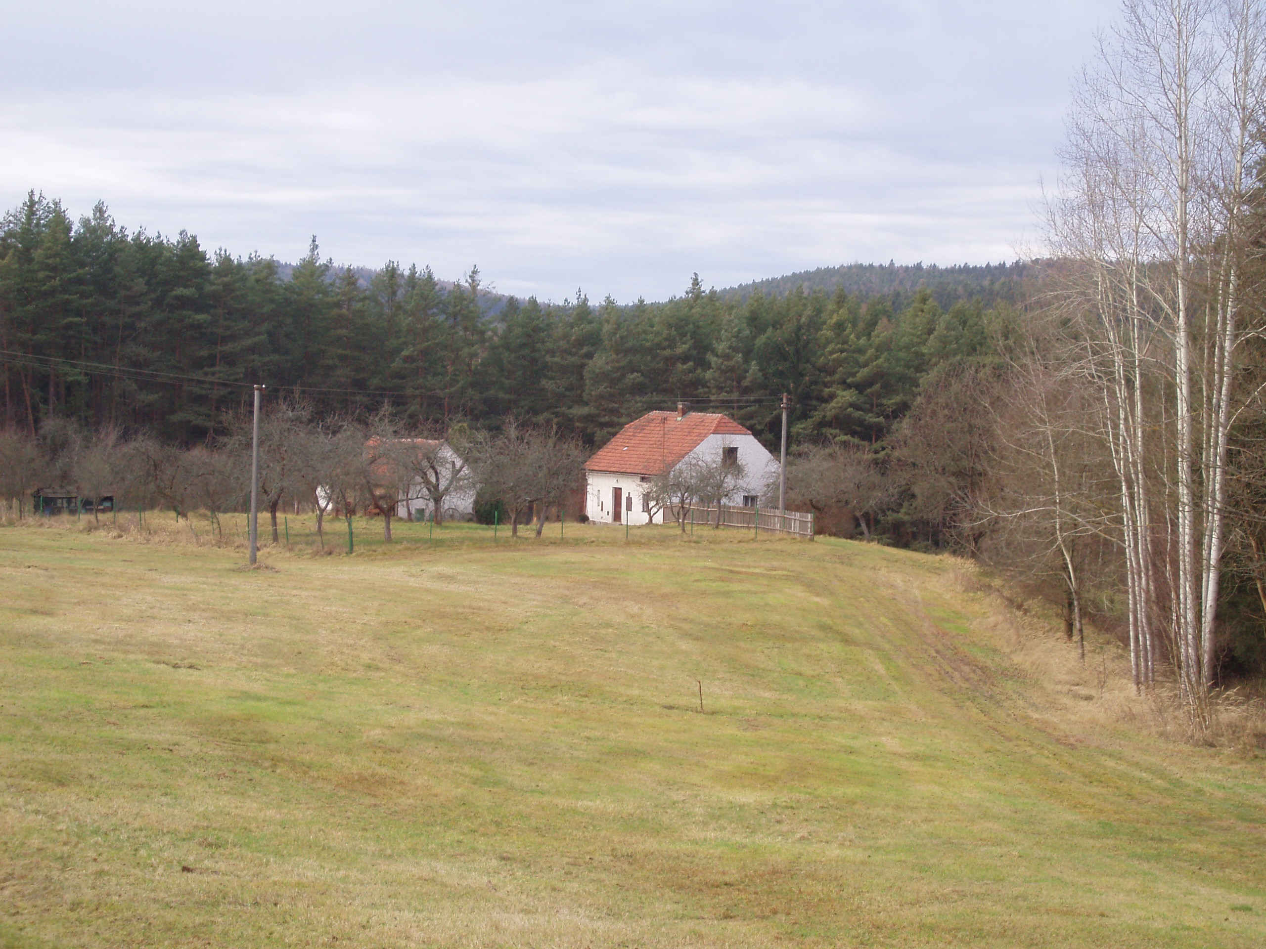 Vaječník - osada u Drevník